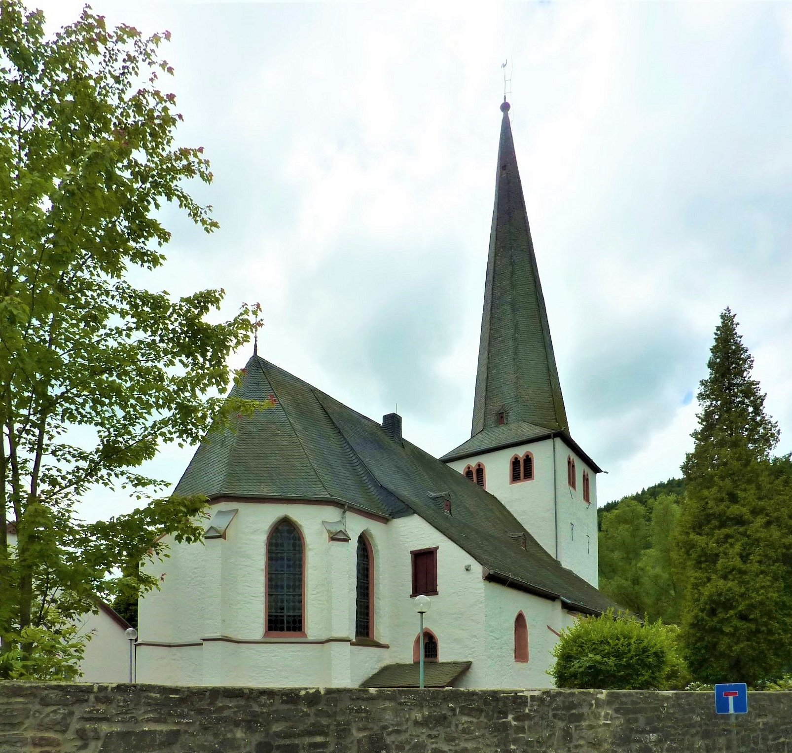 St. Johann Baptist (Olef)1